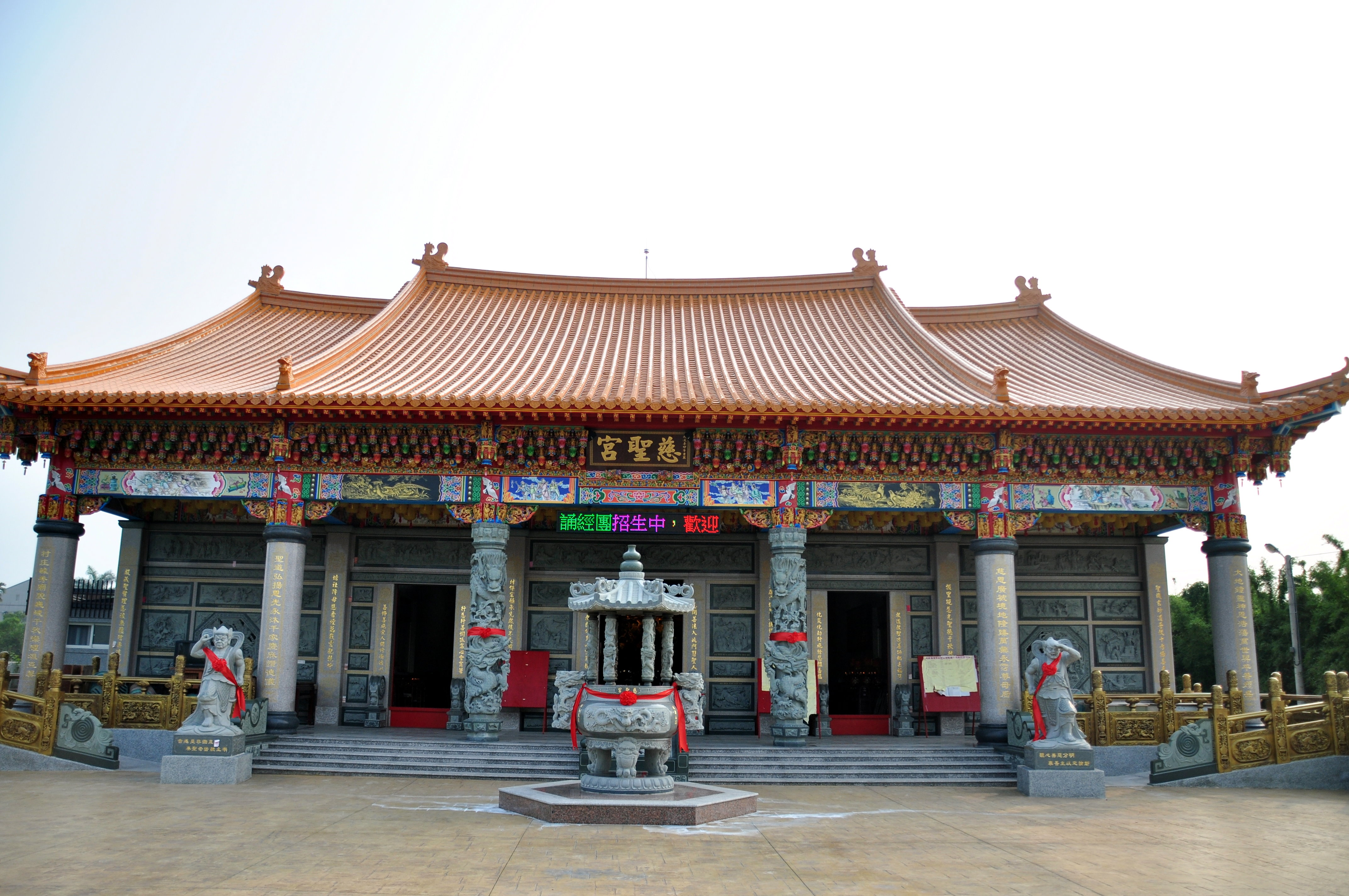 採北式廟宇建築的外觀,廟觀莊嚴肅穆,工藝精湛的石雕藝術,增添豐富的台灣廟宇建築文化.